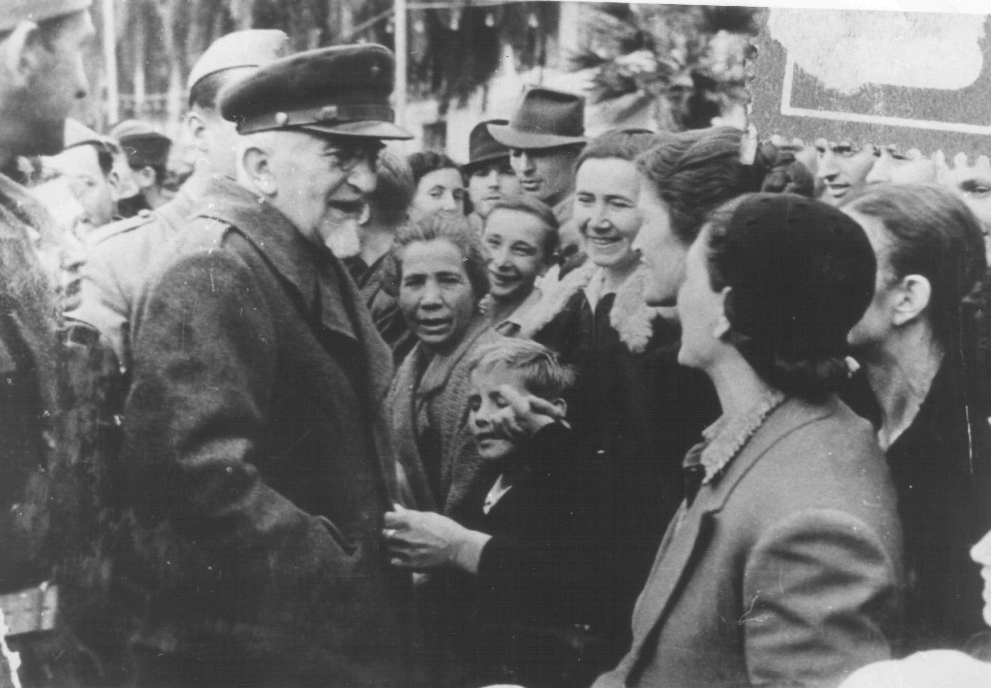 Srpskohrvatski / српскохрватски: Vladimir Nazor sa narodom u oslobođenom Splitu tokom proslave oktobarske revolucije, novembar 1944.